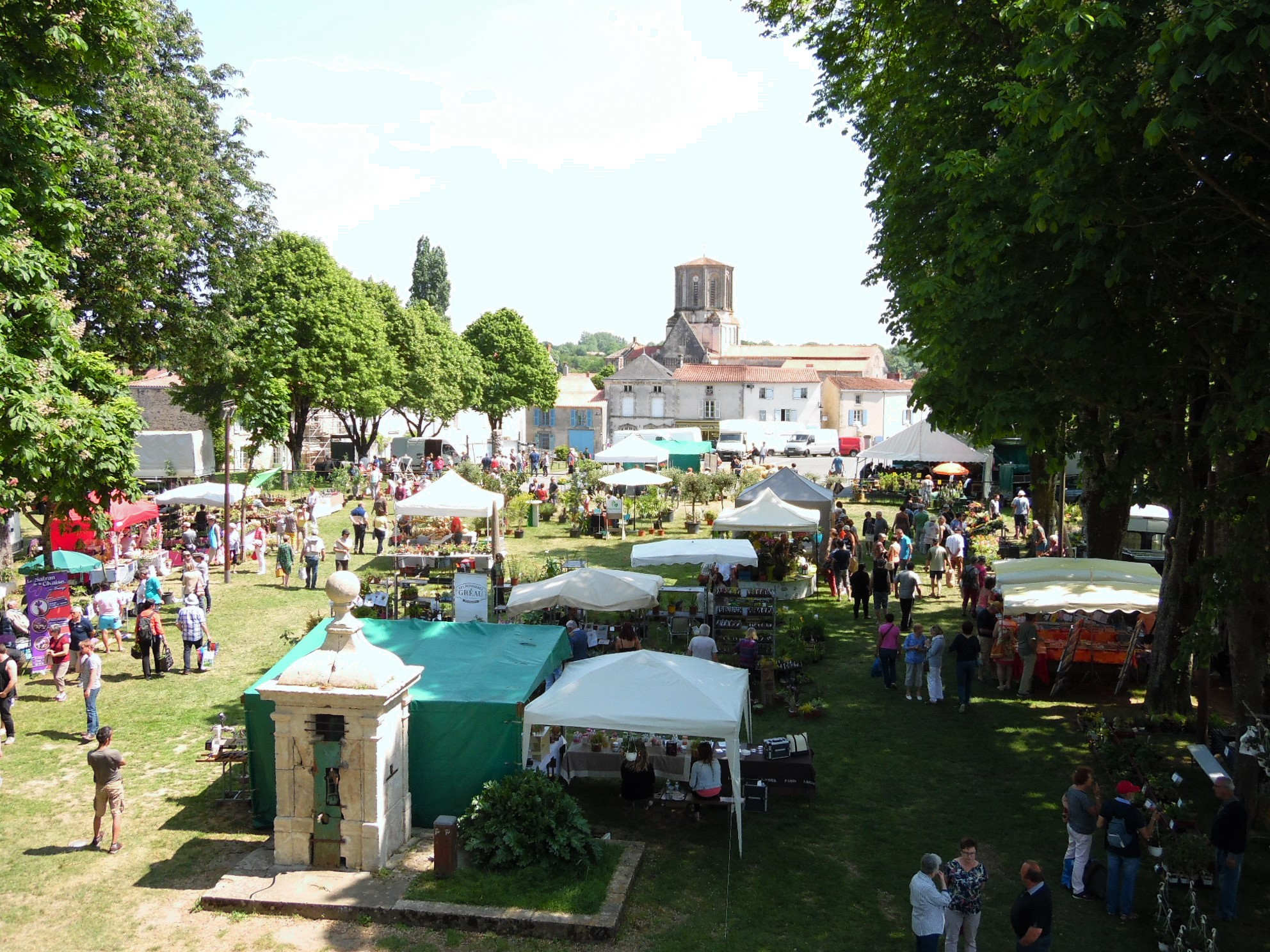 Fête des plantes 2018 de Vouvant. Photo prise de l'entrée de la tour Mélusine.